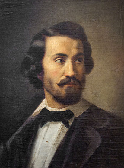 Gheorghe Tattarescu - Autoportret, ulei/pânză, 0,57x0,42m - Muzeul Gheorghe Tattarescu